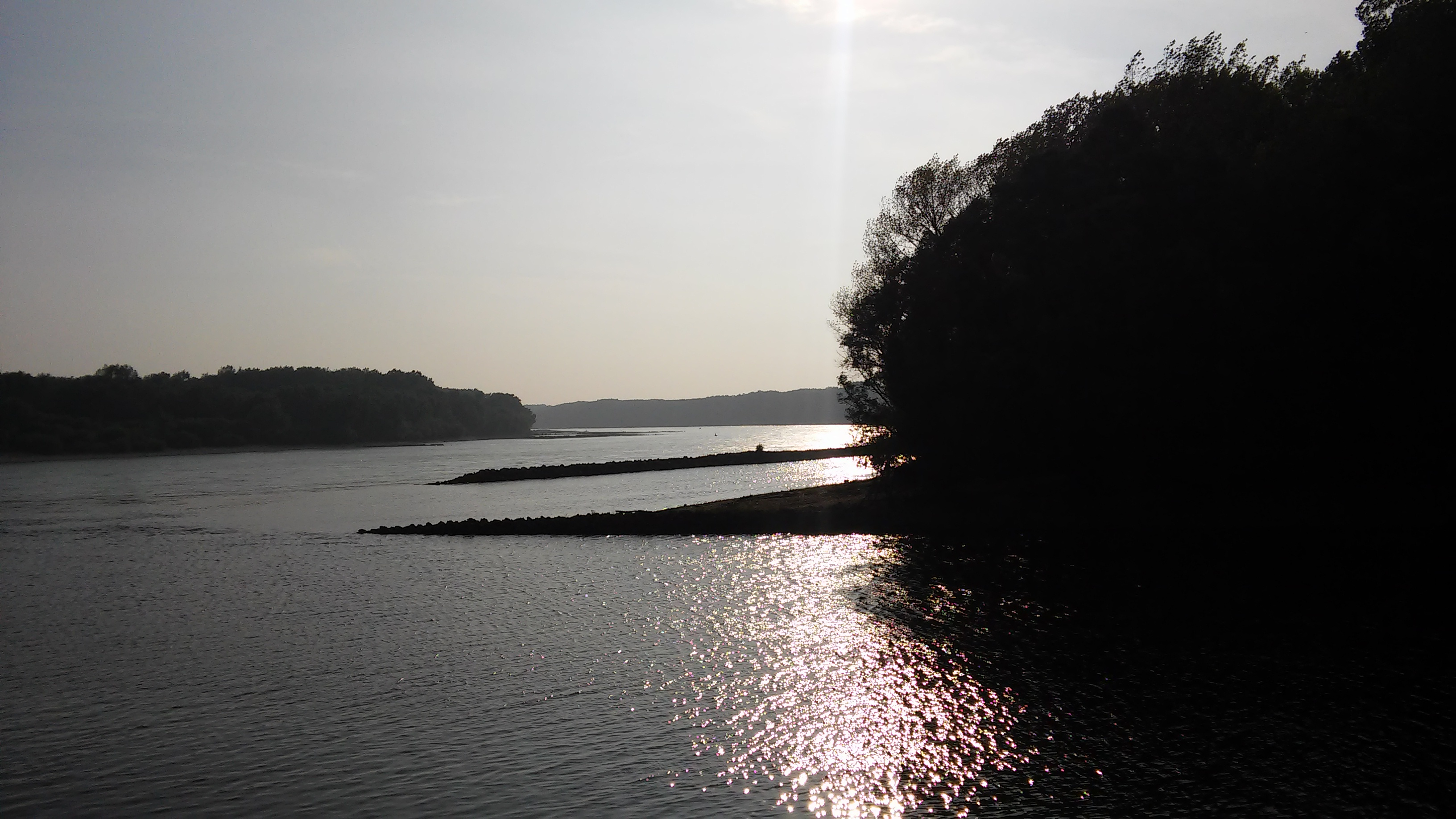 Sútok Dunaja a Moravy